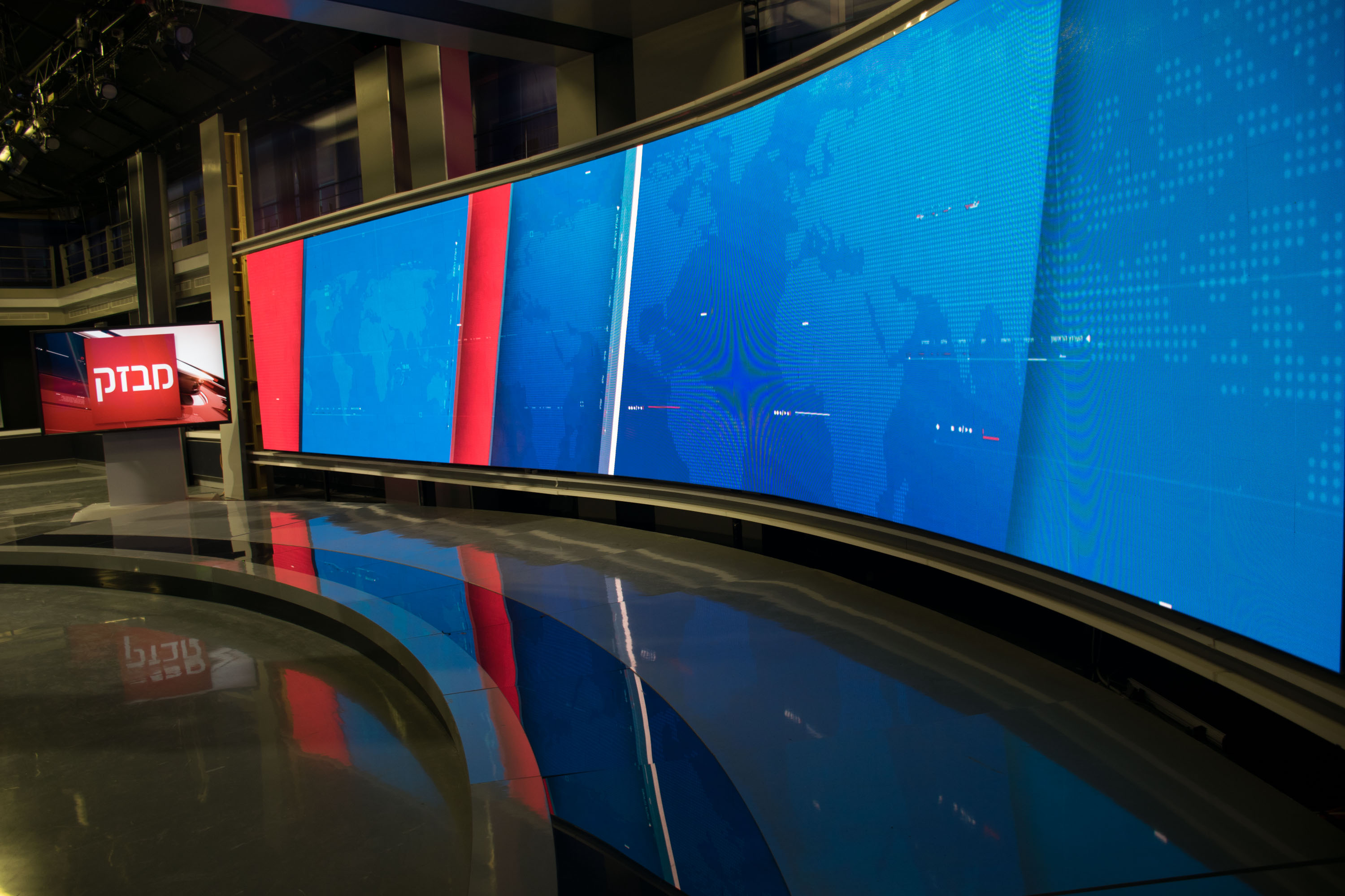 הערוץ הראשון אולפן שידור